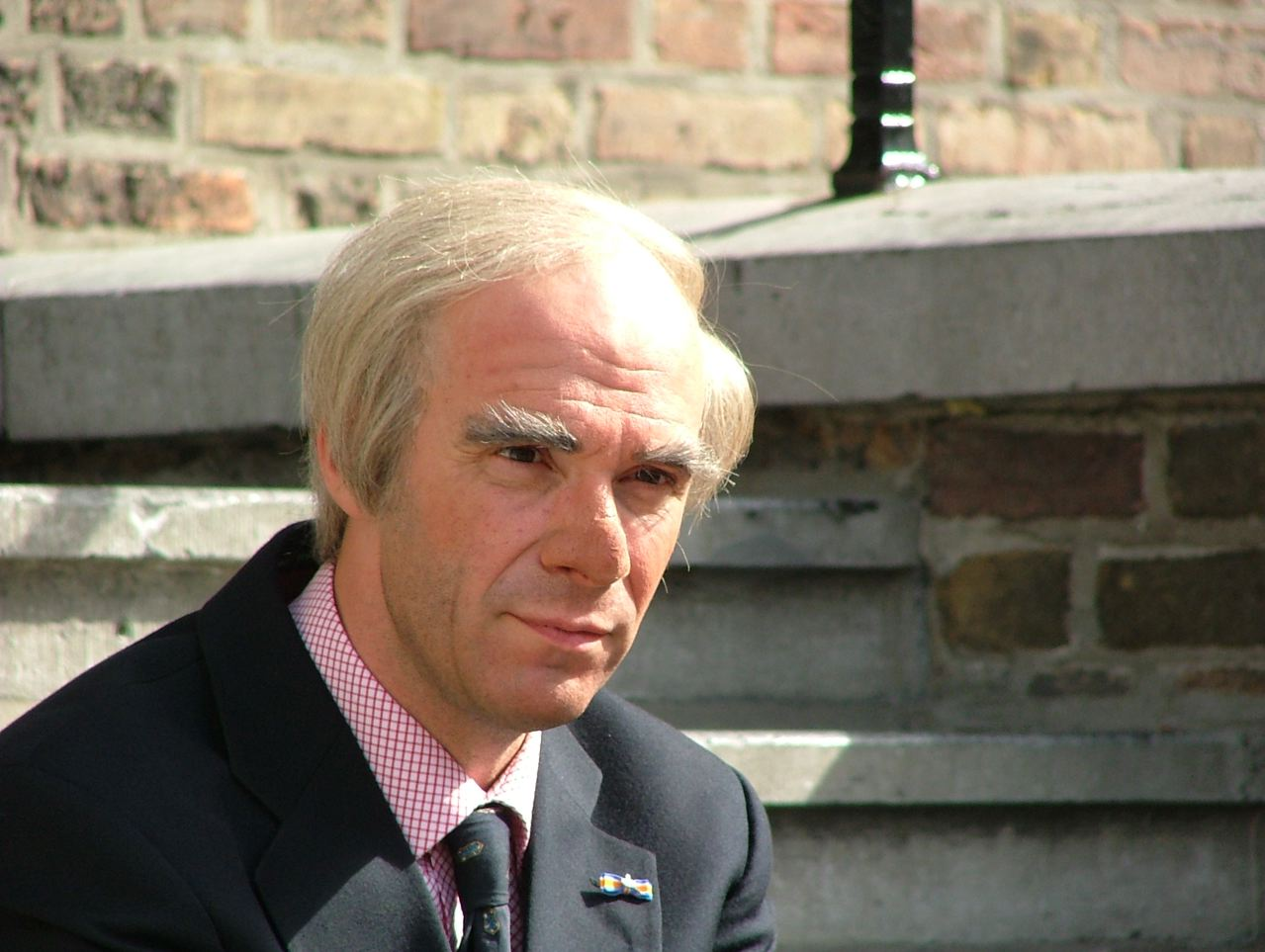 Owen Schumacher (Koefnoen) playing minister Frans WeisglasOwen Schumacher als Weisglas